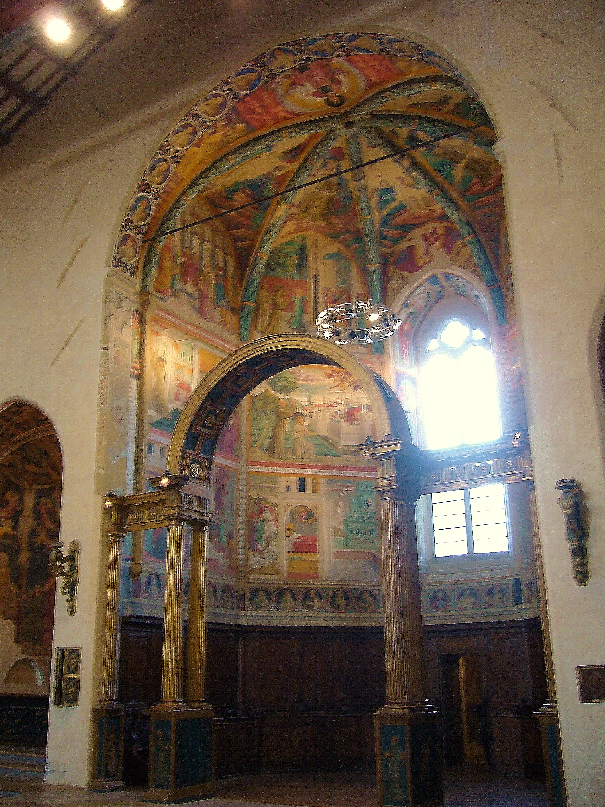 Chiesa di San Francesco_Abside centrale